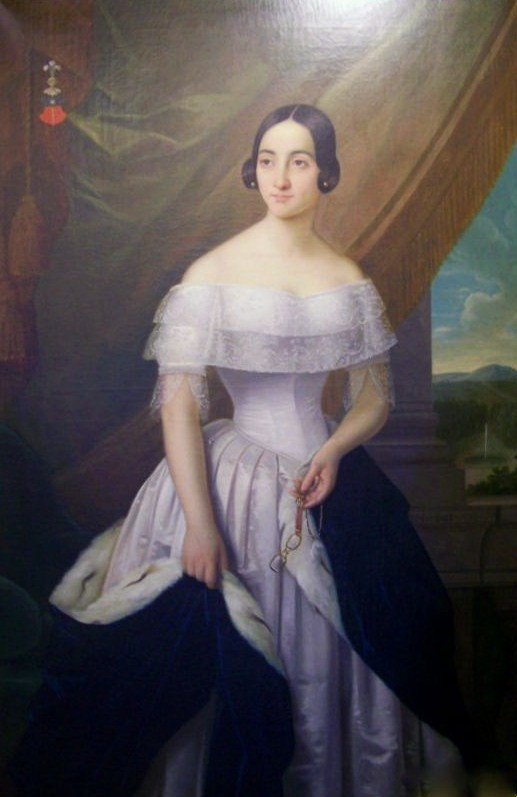 Портрет Е. Дантес-Геккерн. 1840. Н. Вельц